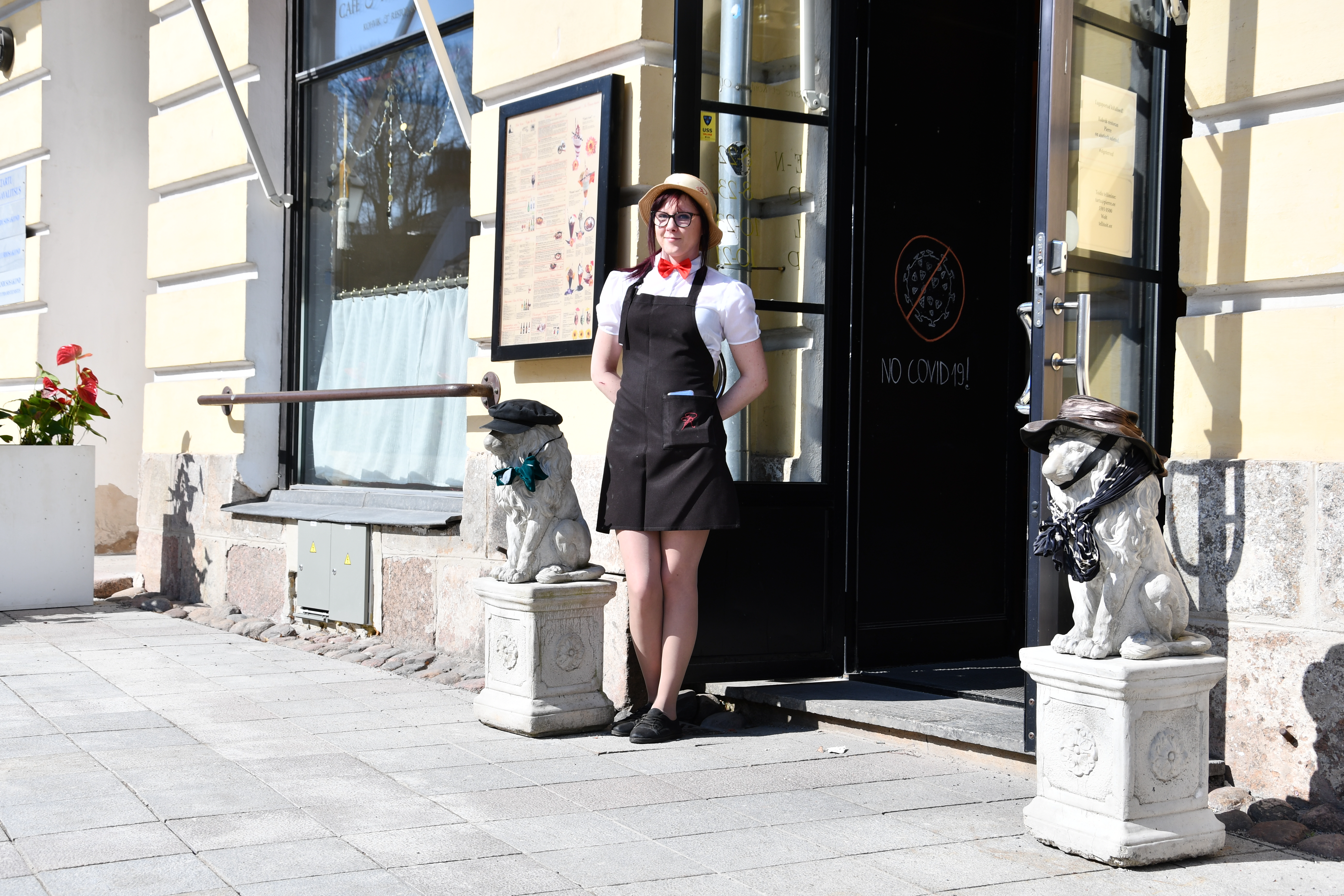 Atmosfäär Tartu raekoja platsil koroonapiirangute valguses 7. aprillil 2020. Kohvik Pierre'i uksel valvab teenindaja, et COVID-19 sisse ei pääseks.